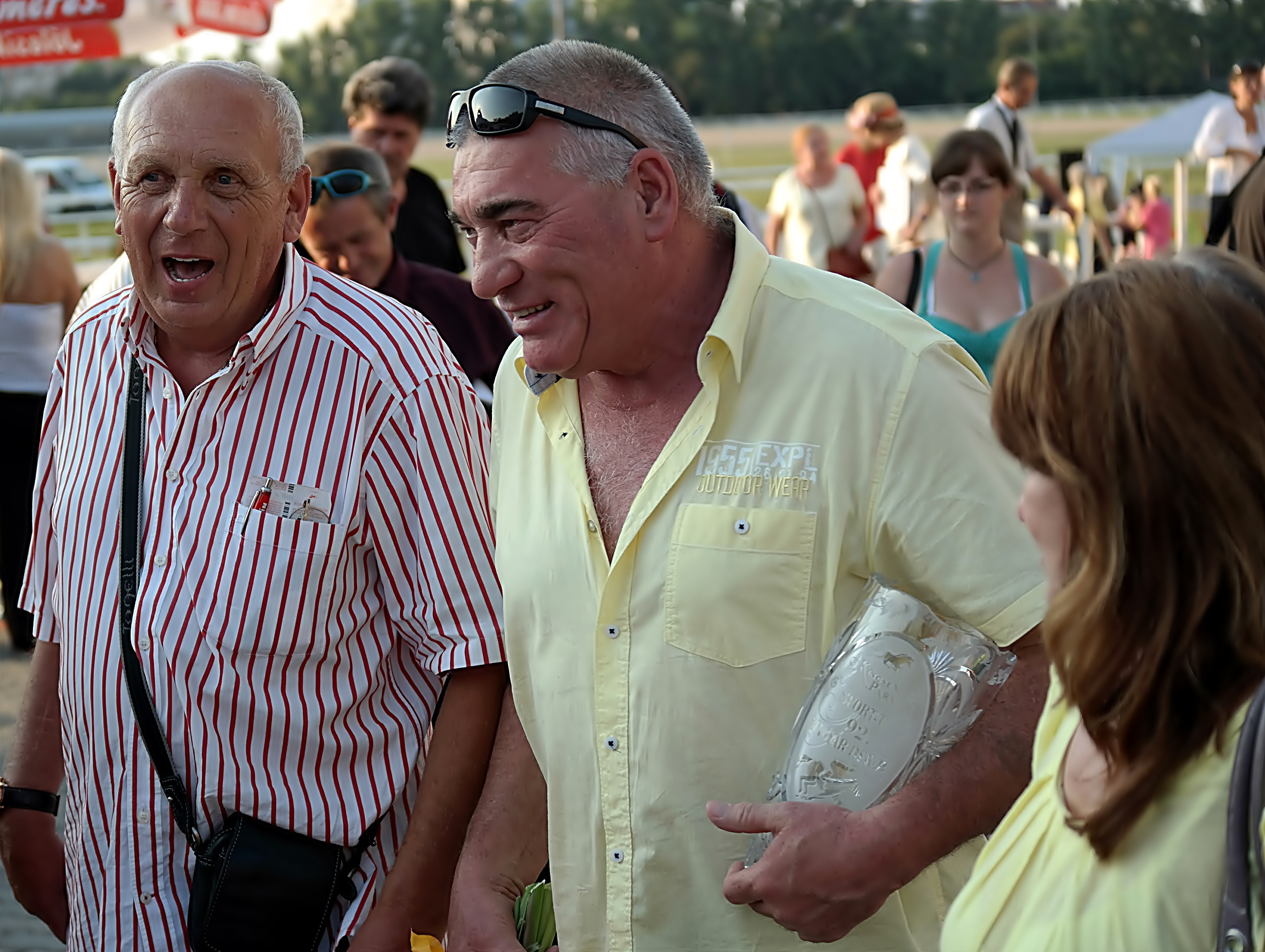 A 92. Magyar Derby. A győztes ló tulajdonosa, Peter Strnisko (középen). Kincsem Park.